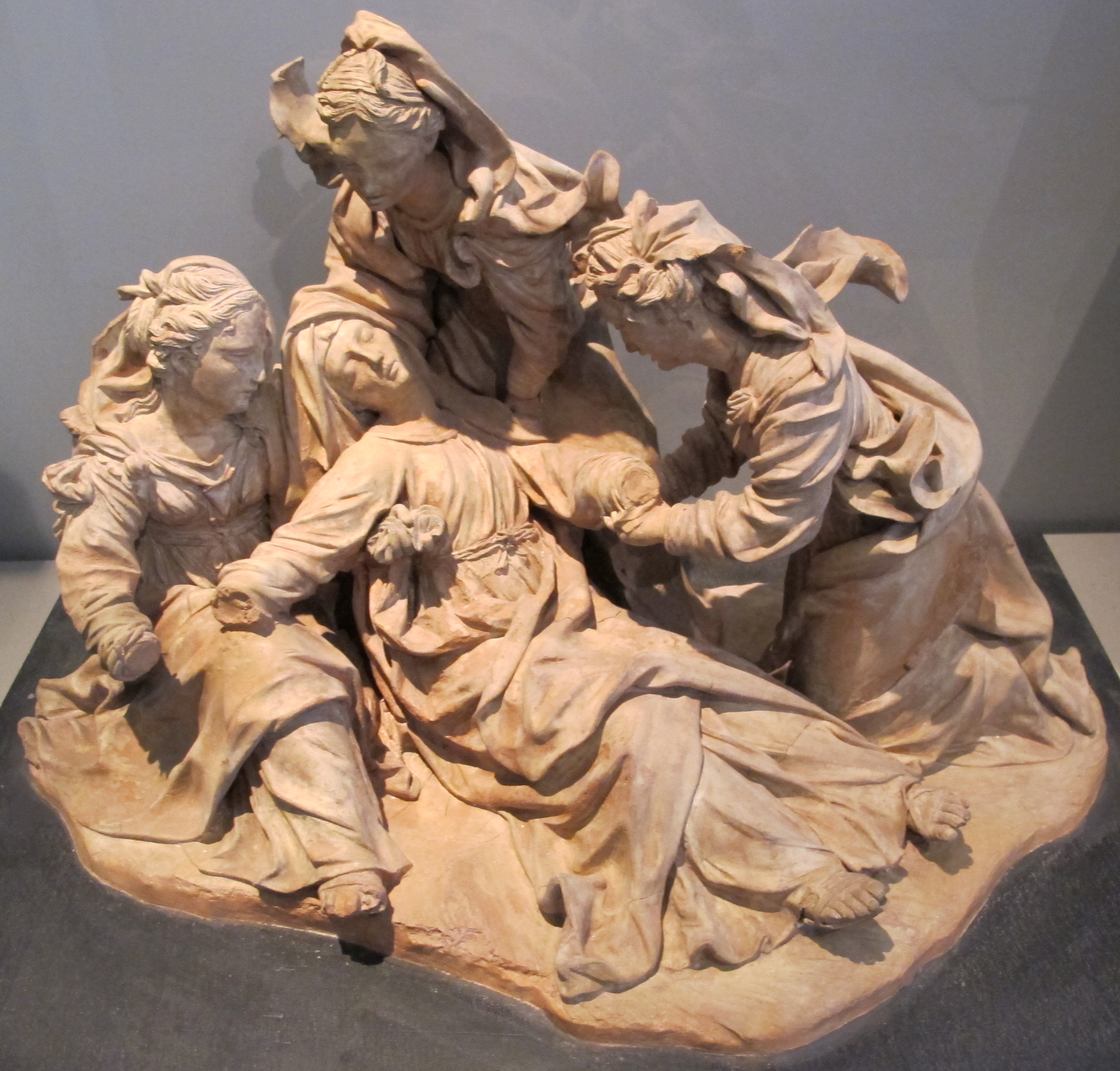 Antonio begarelli, modello per la vergine tra le pie donne, 1530 circa